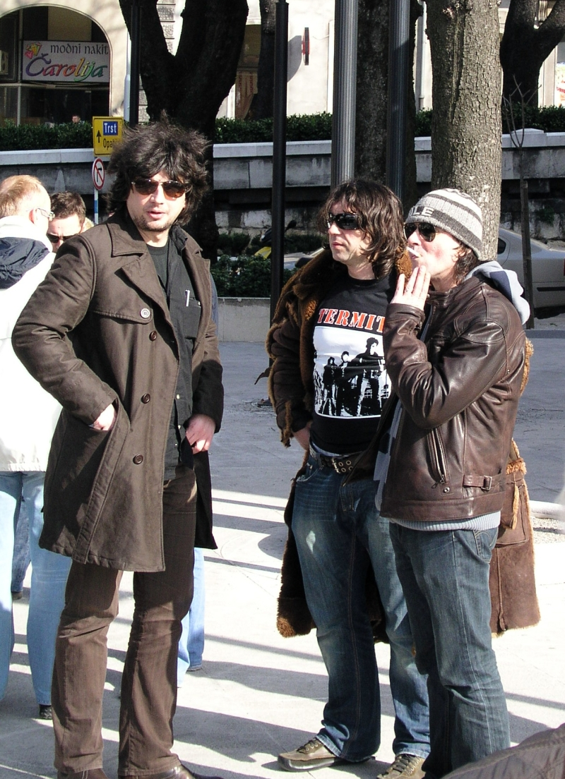 "Riječki novi val" ispred Konta u Rijeci, Mrle i Prlja (Let 3), Hrvatska